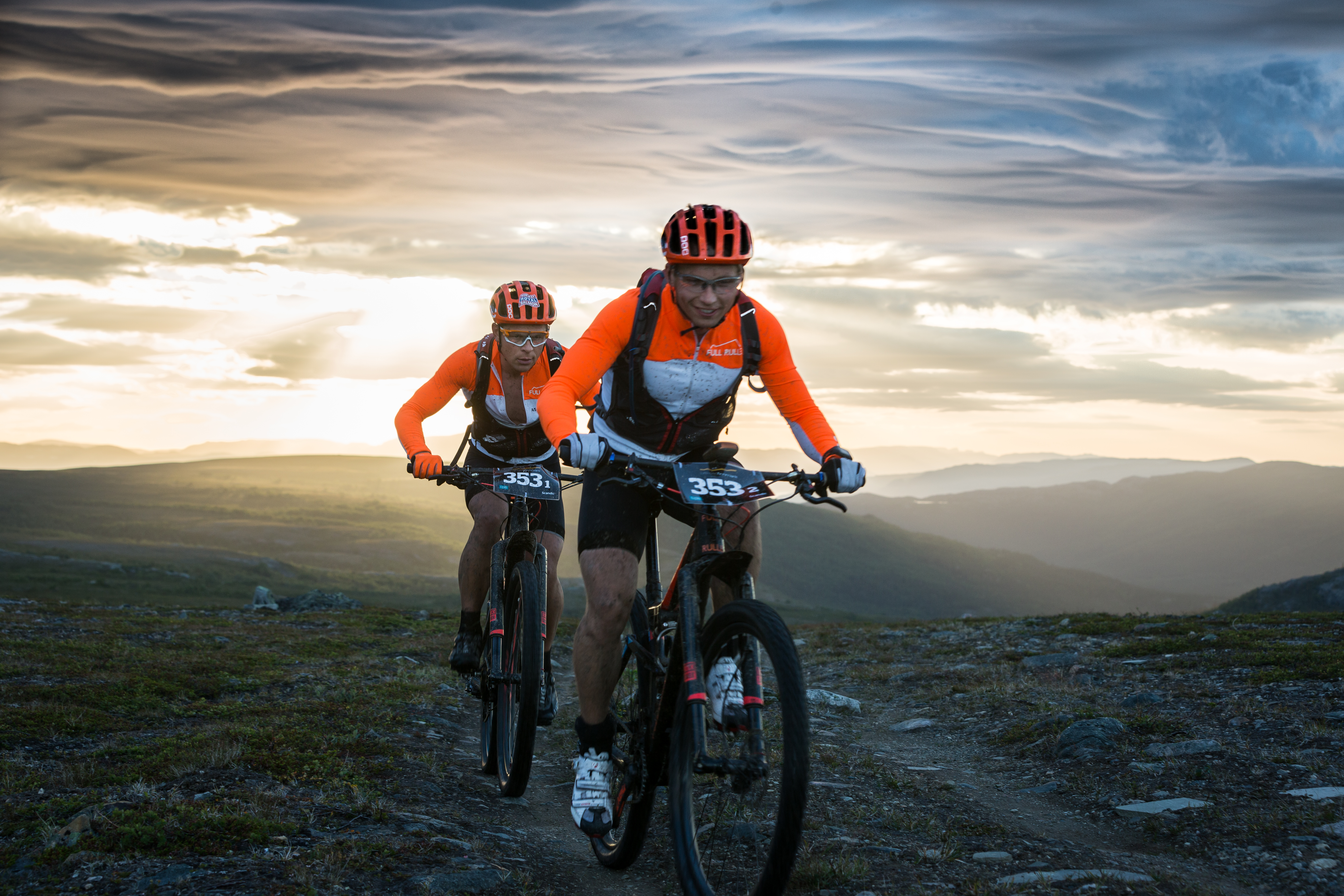 Offroad Finnmark Foto: Steinar Vik